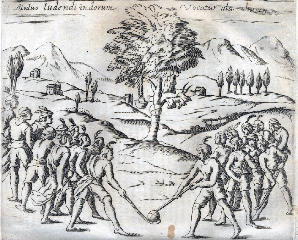 El palín (mapudungun: palin, 'pelotear' ?) o juego de la chueca es una actividad tradicional mapuche con fines religiosos o deportivos que tiene similitud con el hockey y con el juego español de la chueca.